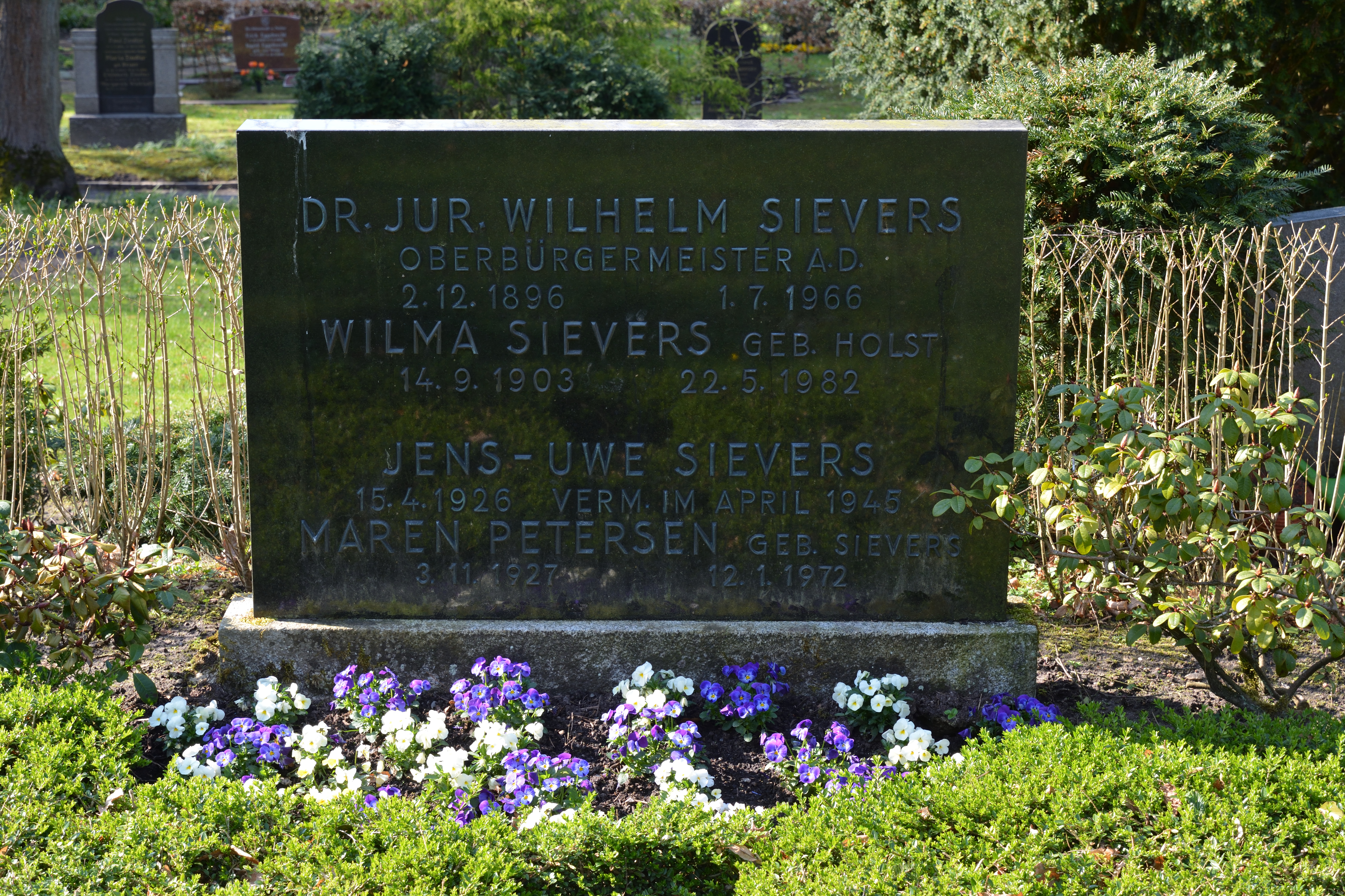 Impressionen vom Nordfriedhof in Kiel: Grab von Wilhelm Sievers (Politiker)